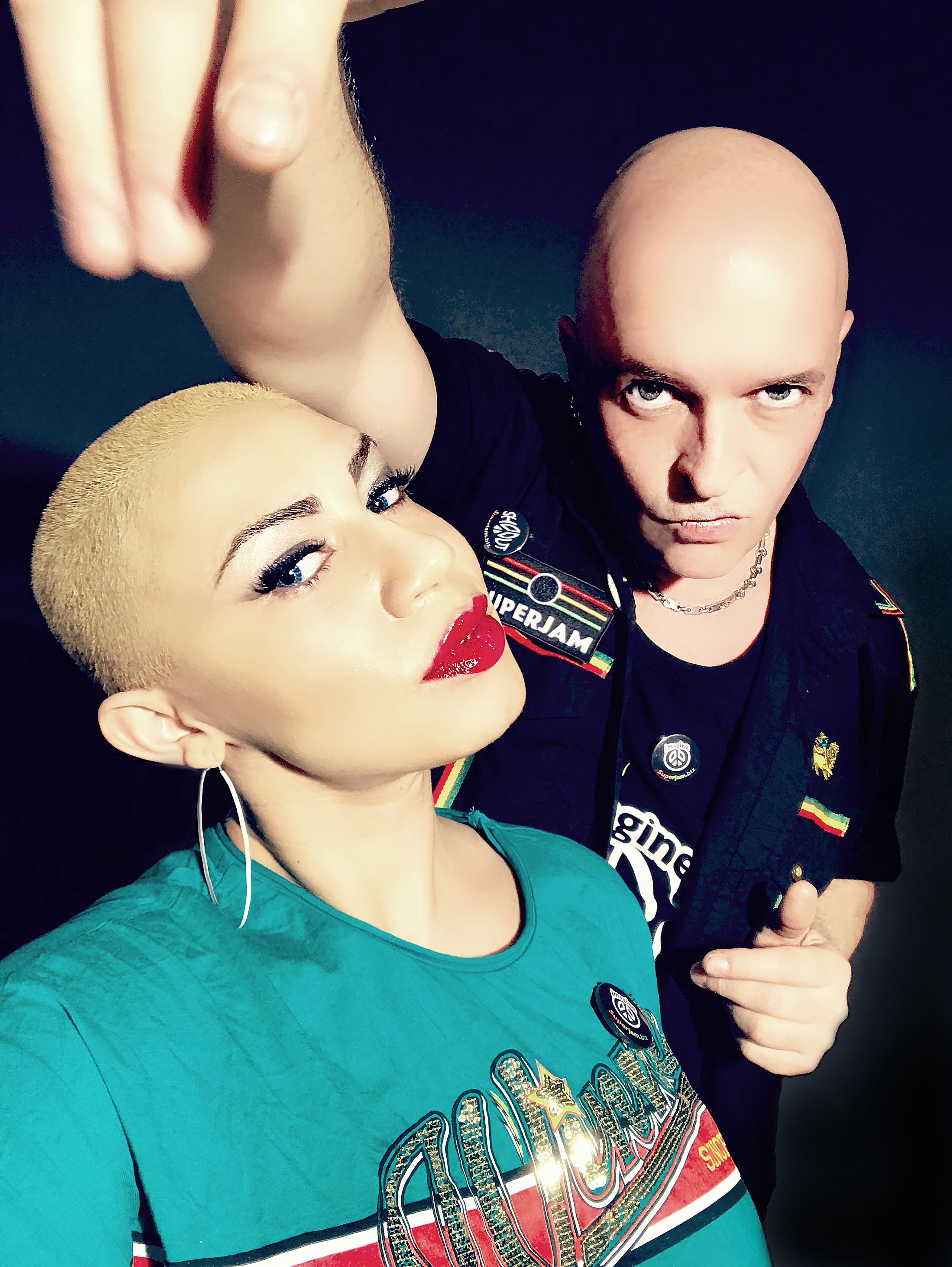 Singer-Songwriter Tommy Kaub und Sängerin Jay Gomes